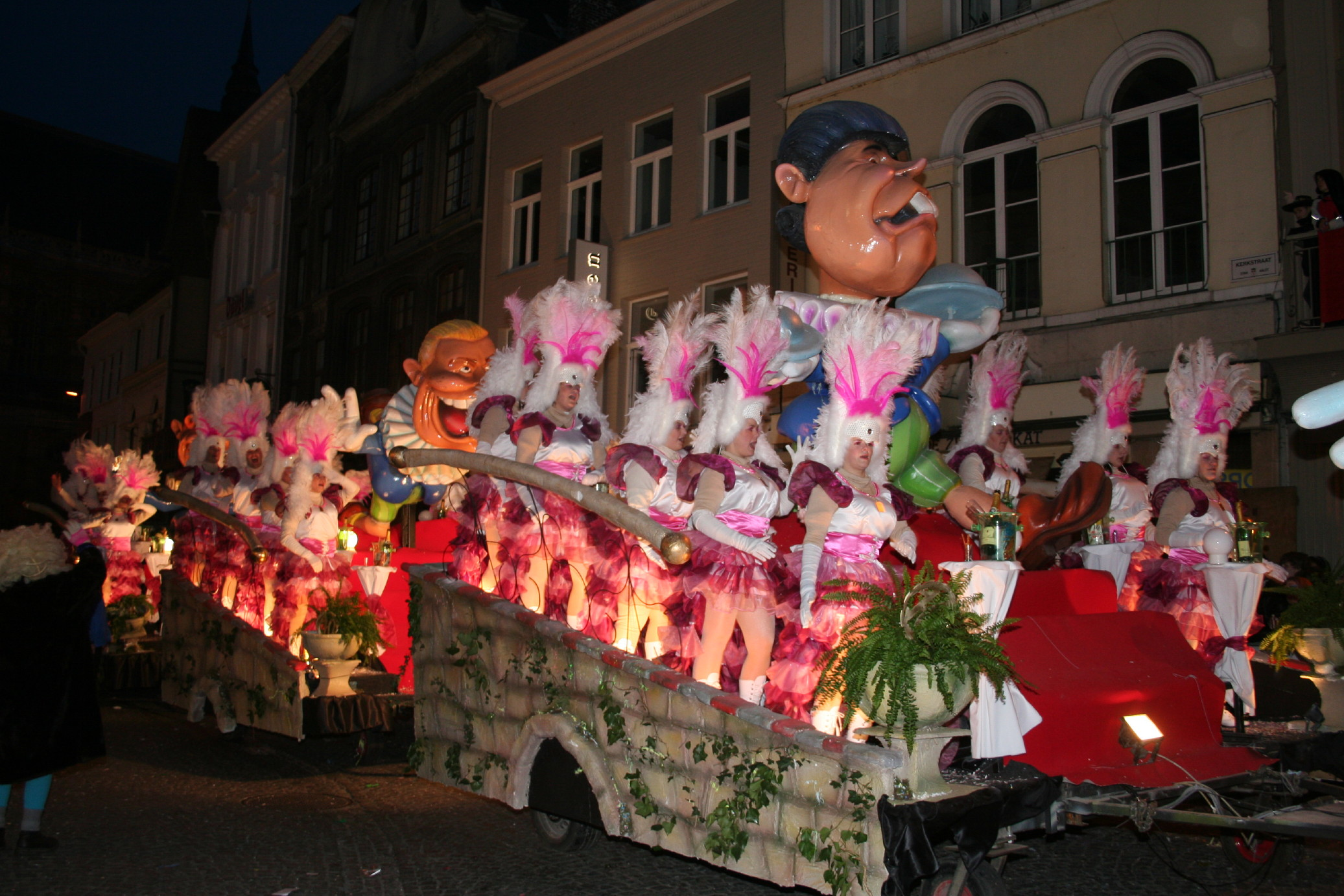 De Droeve Apostelen - stoet Aalst Carnaval, Grote Markt avond